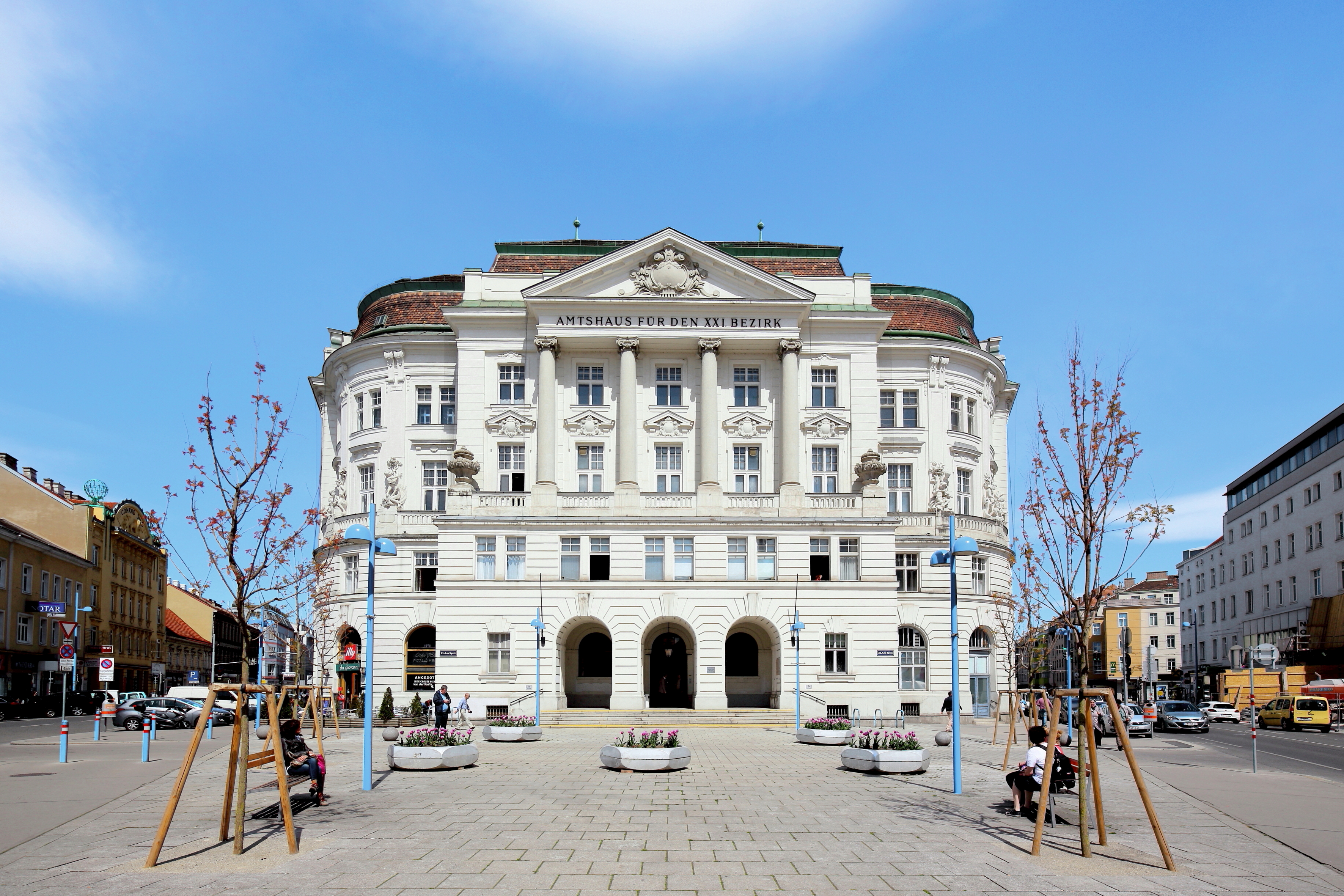 Das Amtshaus für den 21. Bezirk Floridsdorf in der österreichischen Bundeshauptstadt Wien. Das Gebäude in barockklassizistischen Formen wurde von 1901 bis 1903 – noch als Rathaus der Gemeinde Floridsdorf – nach Plänen von Anton und Josef Drexler errichtet.